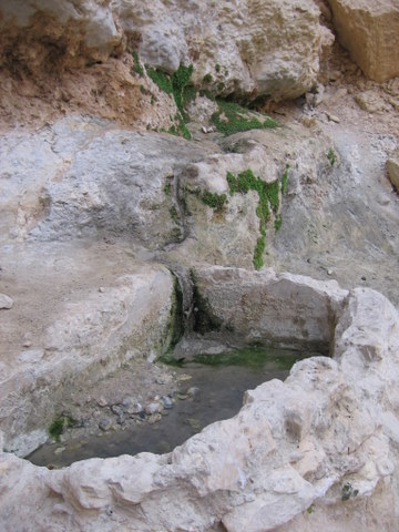 Ein Netafim